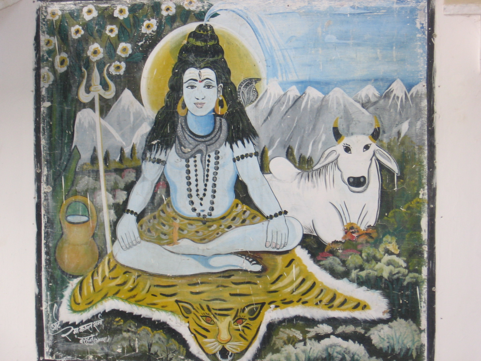 Tradition carried on through a picture. Photo by Milan Fujda.